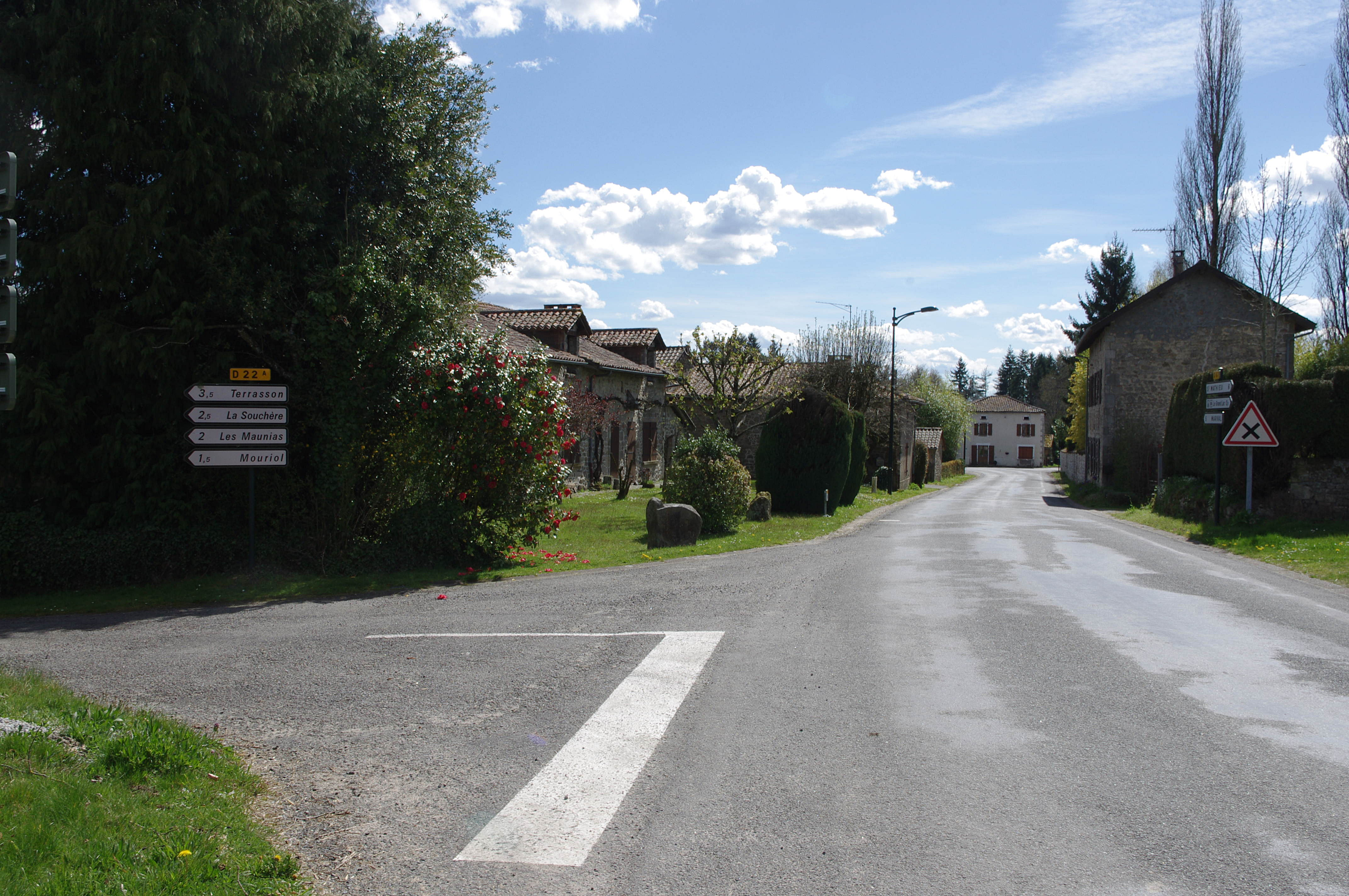 Milhaguet, commune de Marval, Haute-Vienne, France.